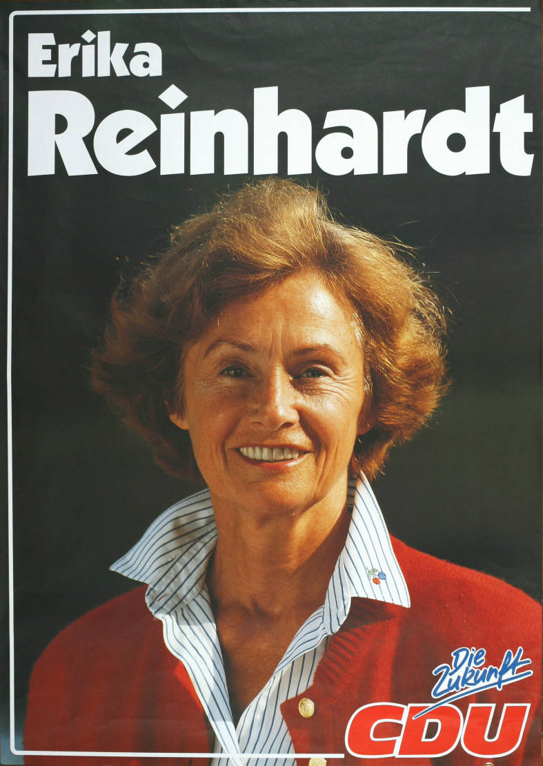 Erika Reinhardt Die Zukunft CDUAbbildung:PorträtfotoPlakatart:Kandidaten-/Personenplakat mit PorträtObjekt-Signatur:10-001: 3516Bestand:Plakate zu Bundestagswahlen (10-001)GliederungBestand10-18:Plakate zu Bundestagswahlen (10-001) » Die 12. Bundestagswahl am 2. Dezember 1990 » CDU » Mit PorträtfotoLizenz:KAS/ACDP 10-001: 3516 CC-BY-SA 3.0 DE